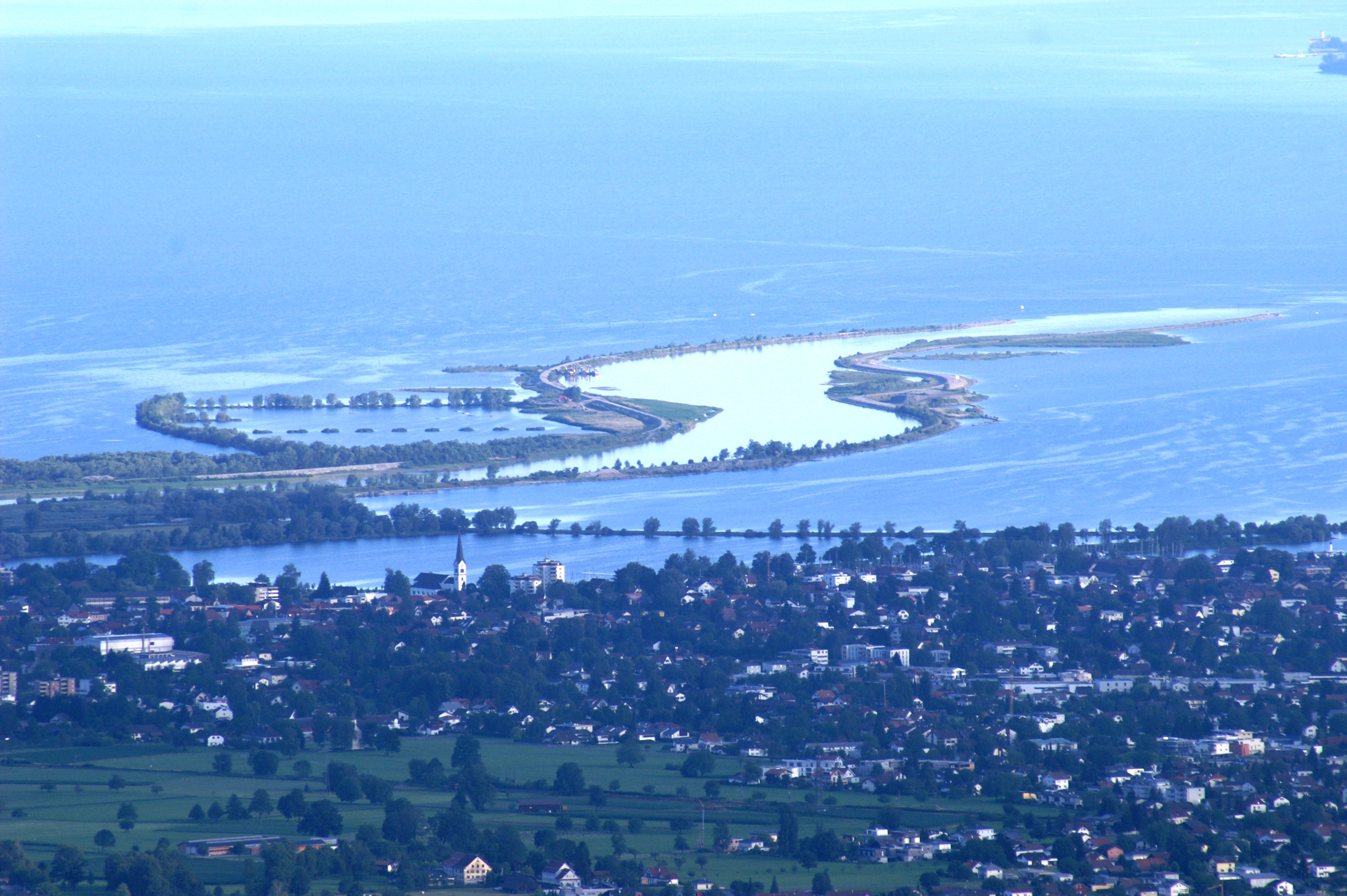 Rhein-Mündung bei Hard Blick von der Bödelestrasse (siehe unten: google maps).